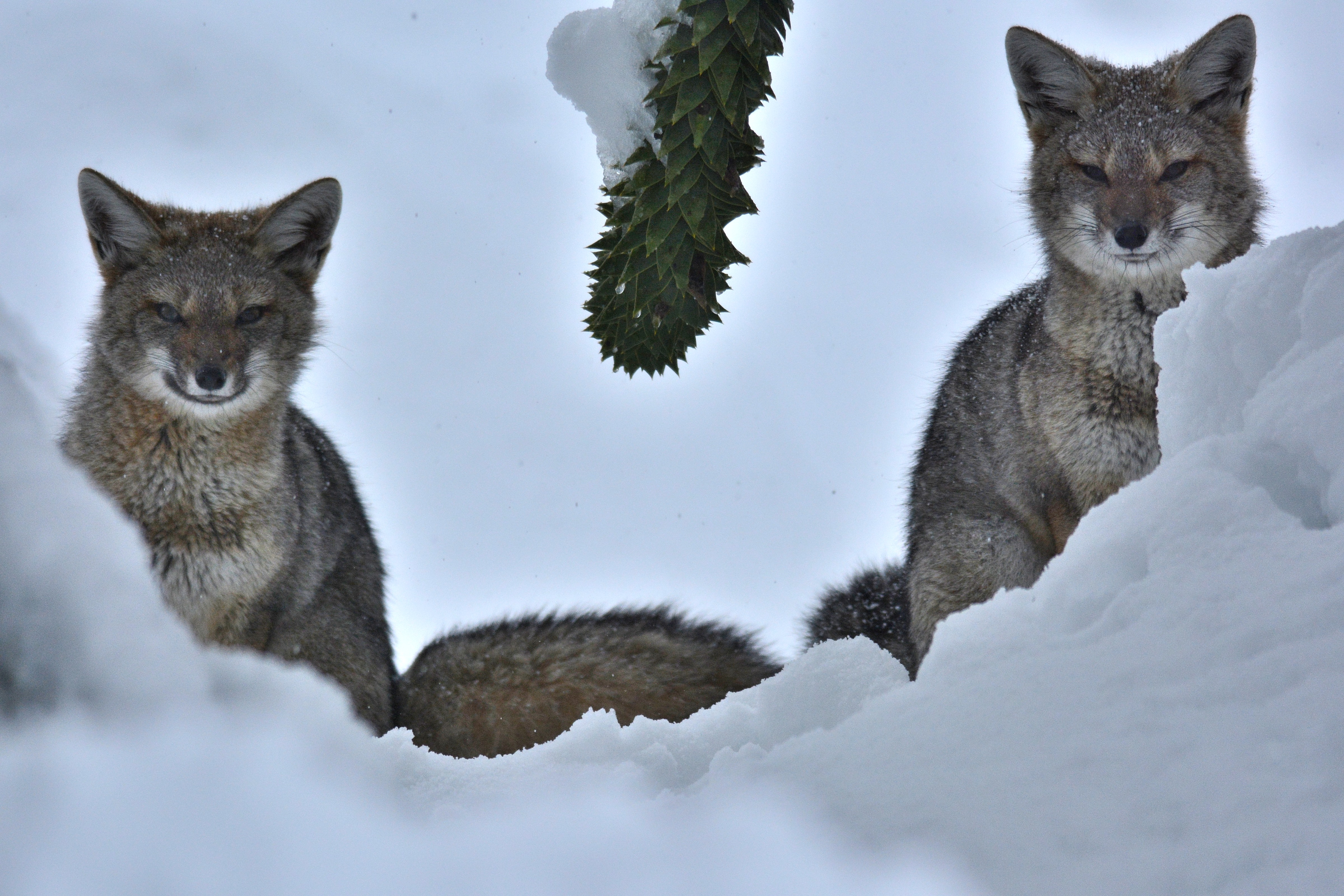 Pareja Zorro Chilla, zona Araucanía, Chile